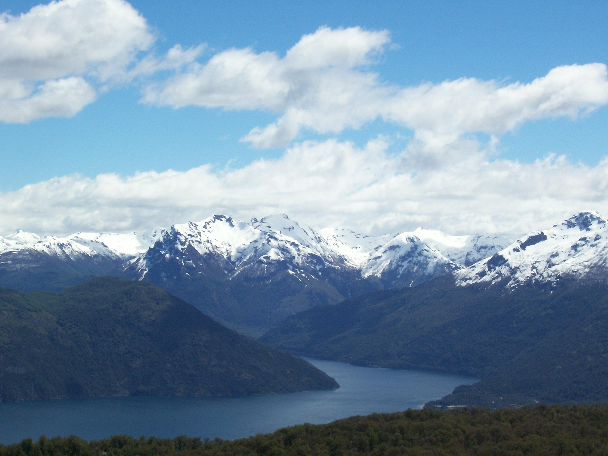 Imagen del Lago Futalaufquen, en el Parque Nacional Los Alerces. Chubut, Argentina